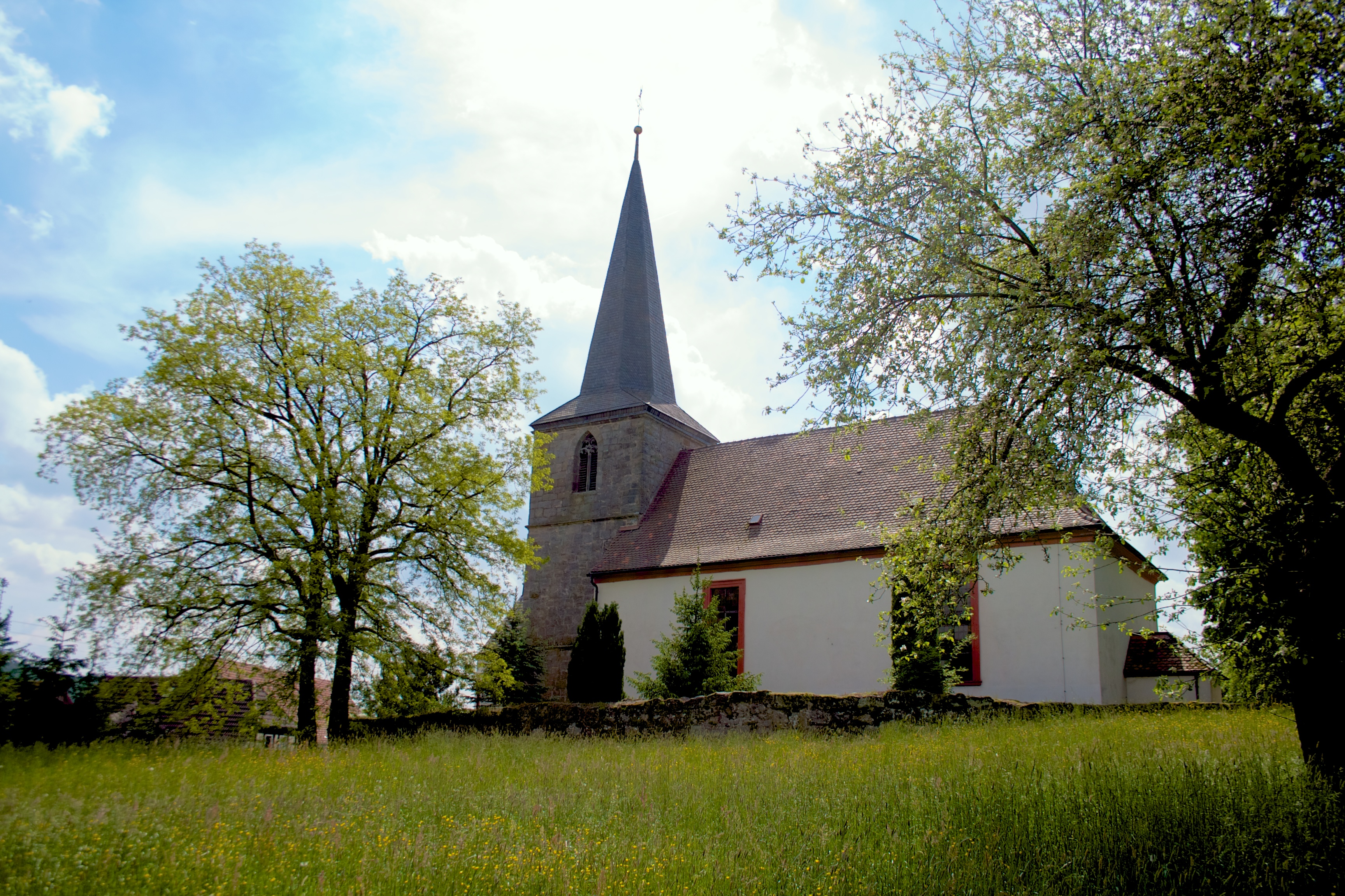 Die Kirche von Oberelldorf. Rückansicht